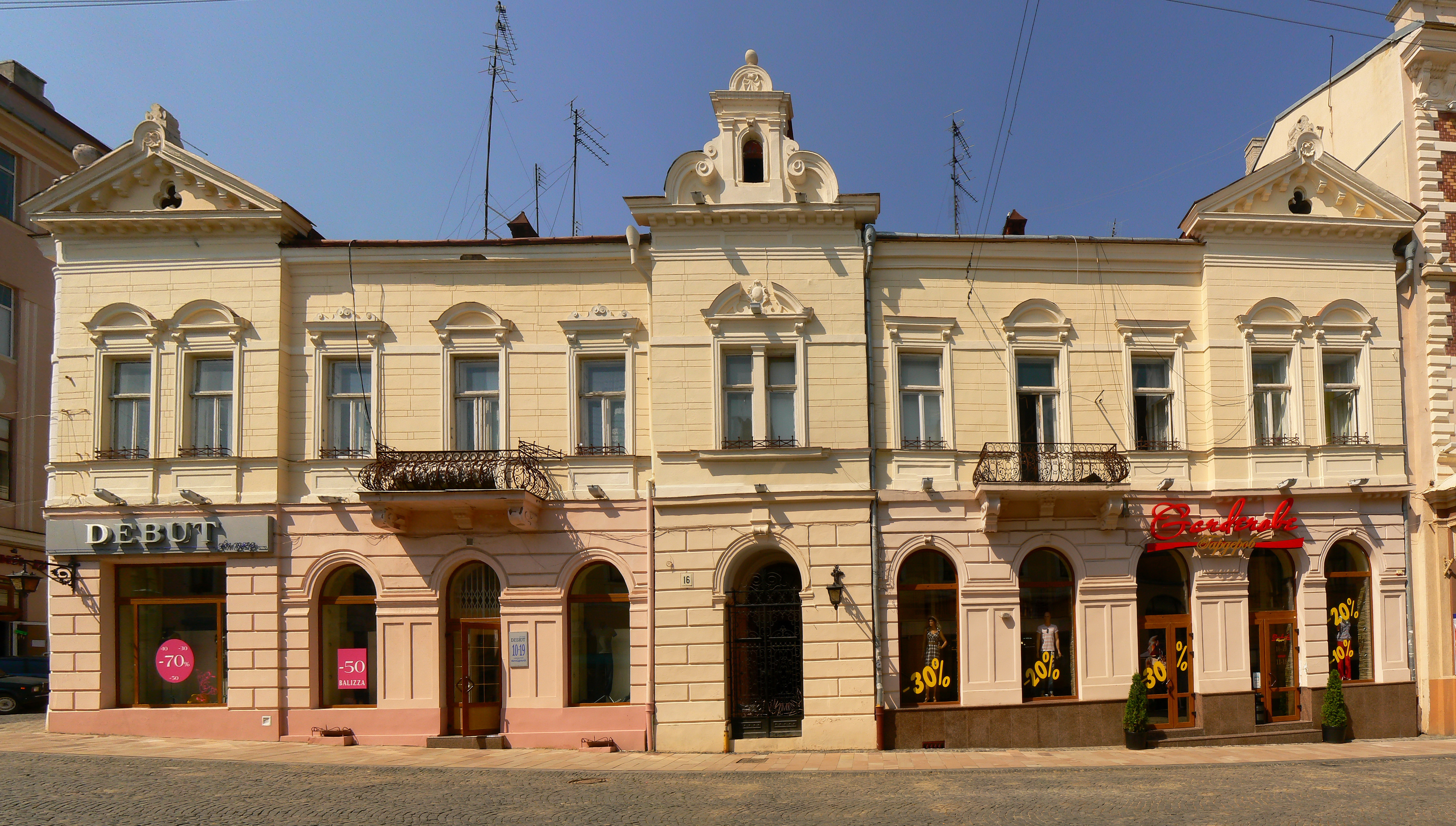 Кобиляеської, 16